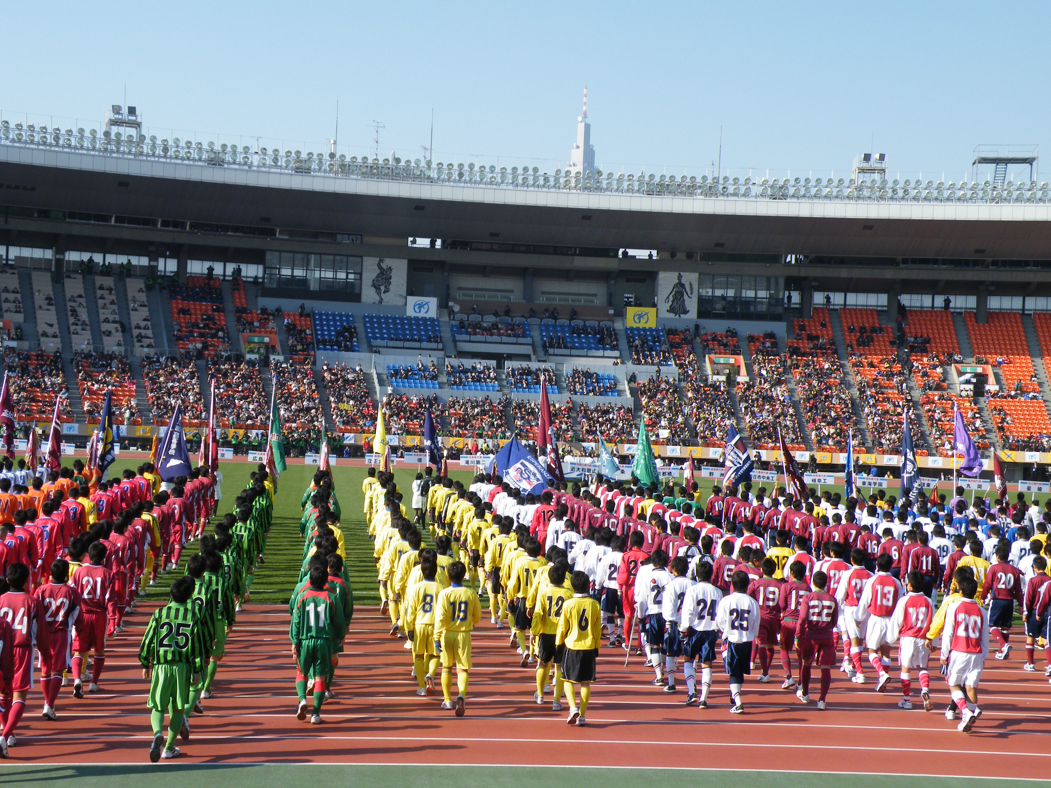 第87回全国高等学校サッカー選手権大会の開会セレモニー